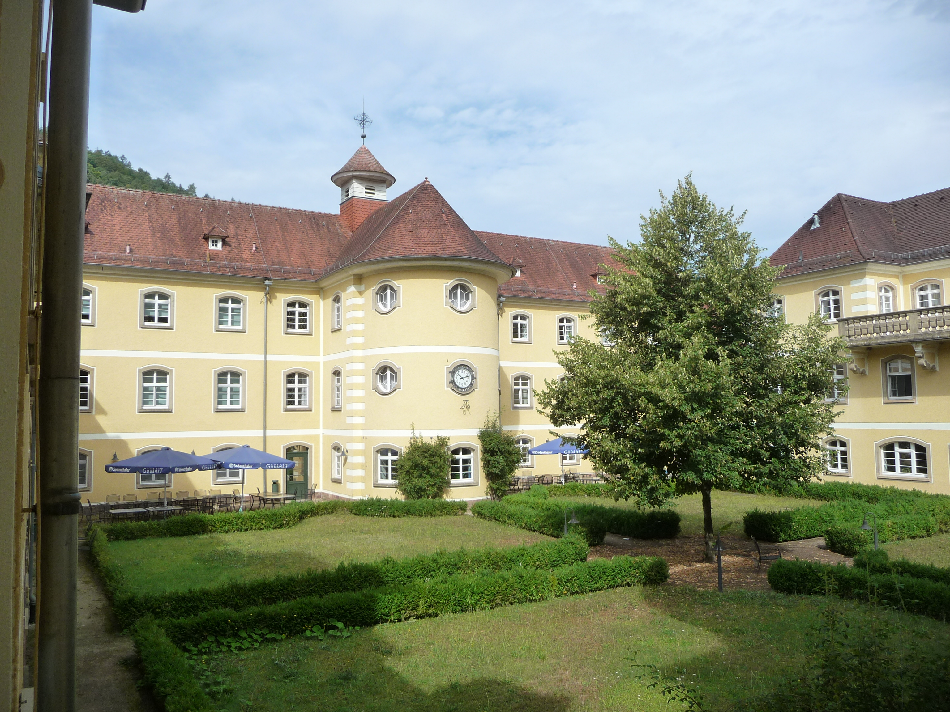 Die Orthopädische Universitätsklinik Heidelberg in Heidelberg-Schlierbach ist das orthopädisch-chirurgische Zentrum für Akut- und chronisch Kranke, für Verletzte und für Menschen mit Verschleißerkrankungen in Nordbaden. Zum Leistungsspektrum gehören Operationen wie nichtoperative Behandlungsformen